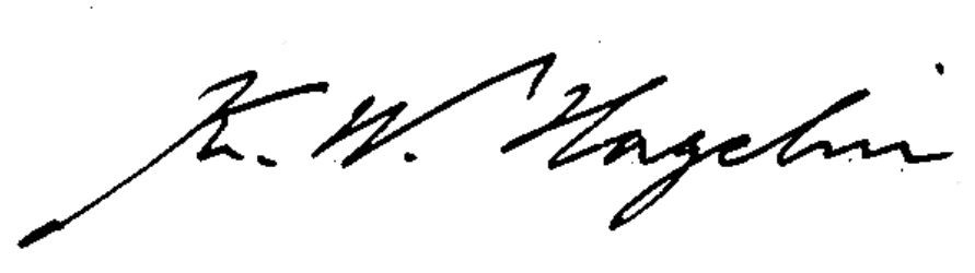 Karl Wilhelm Hagelins signatur på en lantmäterihandling